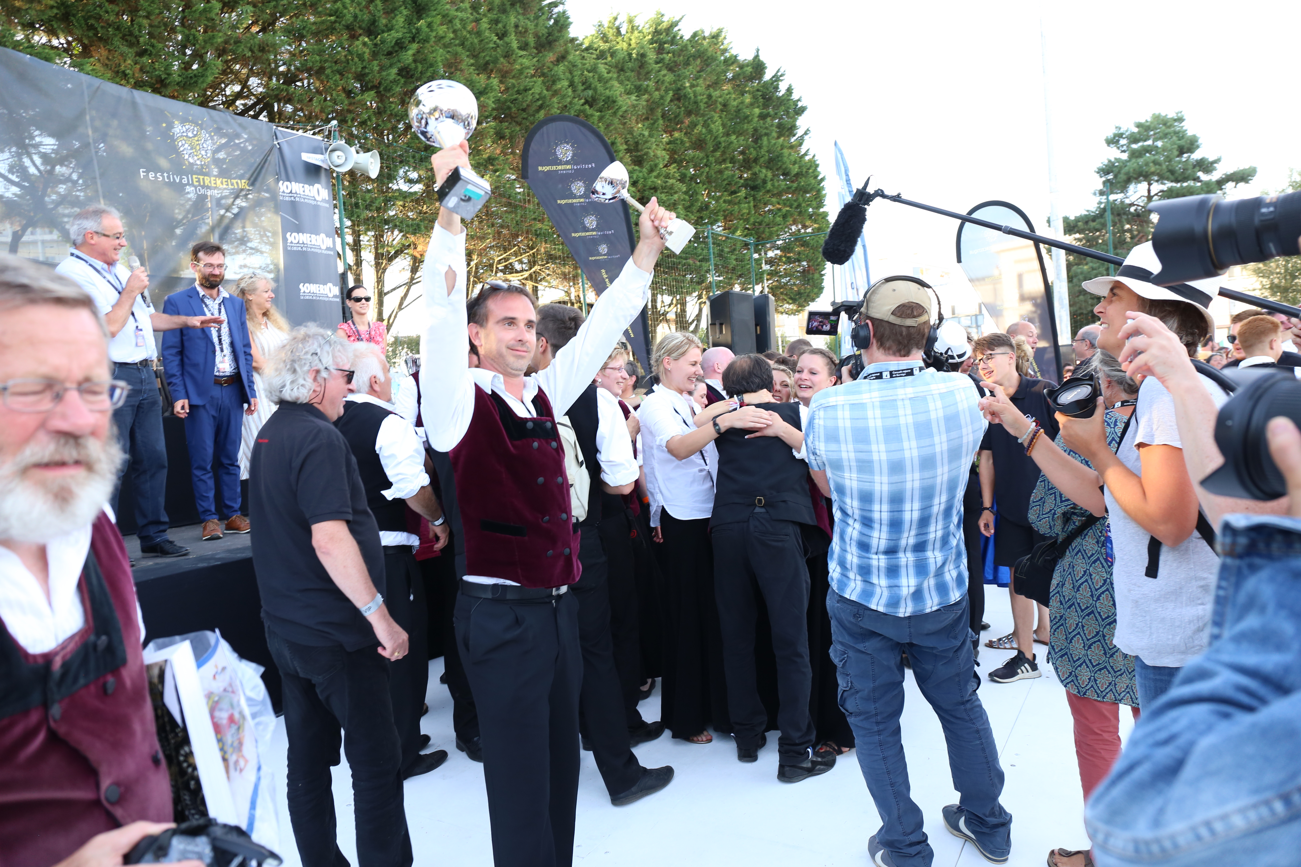 Annonce des résultats et remise des prix du championnat national des bagadoù 2018 (2e et 4e catégorie) organisé par Sonerion dans le cadre du festival interceltique de Lorient le 4 août 2018.